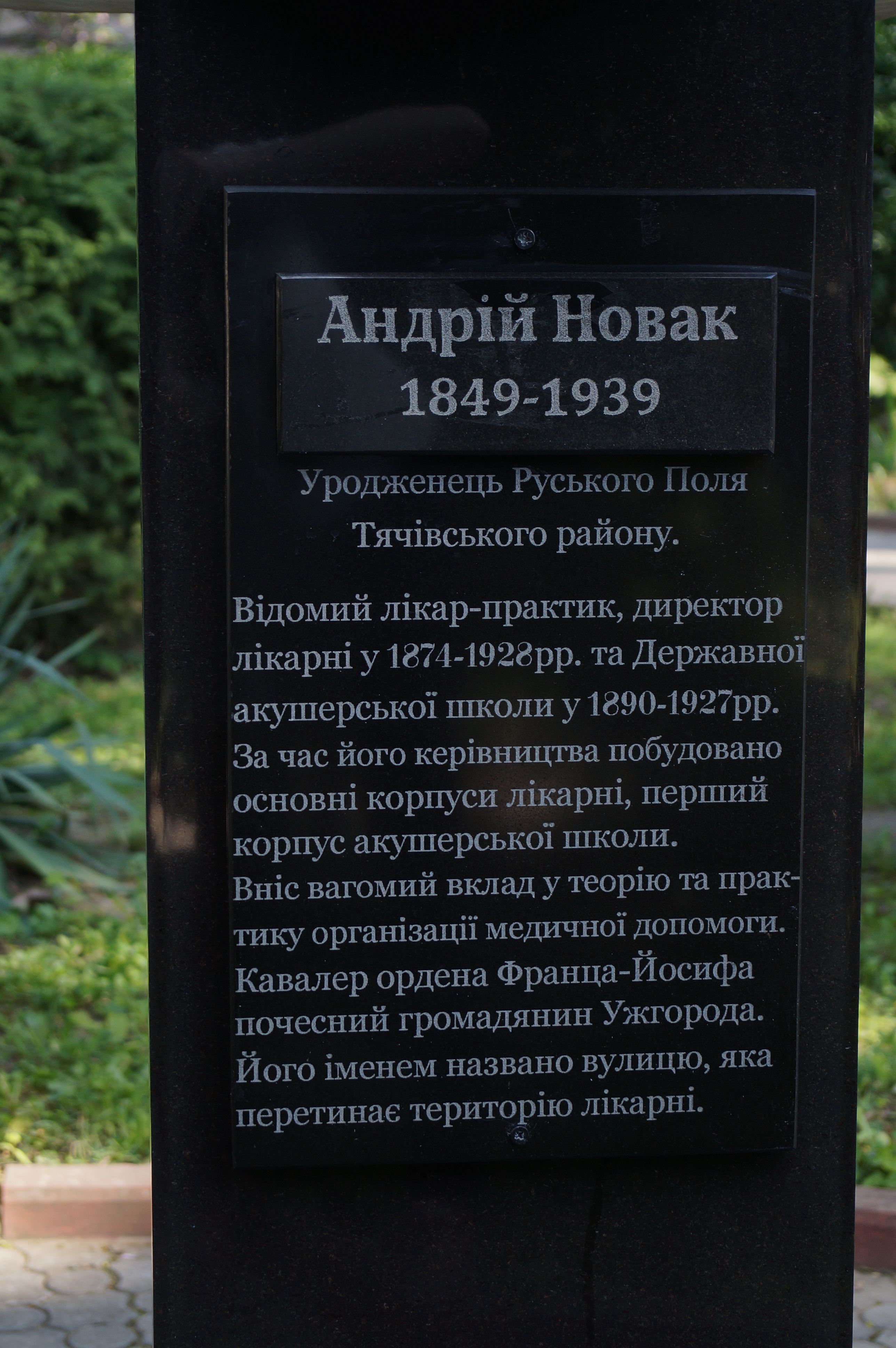 Мем.дошка на честь лікаря Е.Новака – засновника Ужгородської лікарні, Ужгород, Буд.обл.лікарні